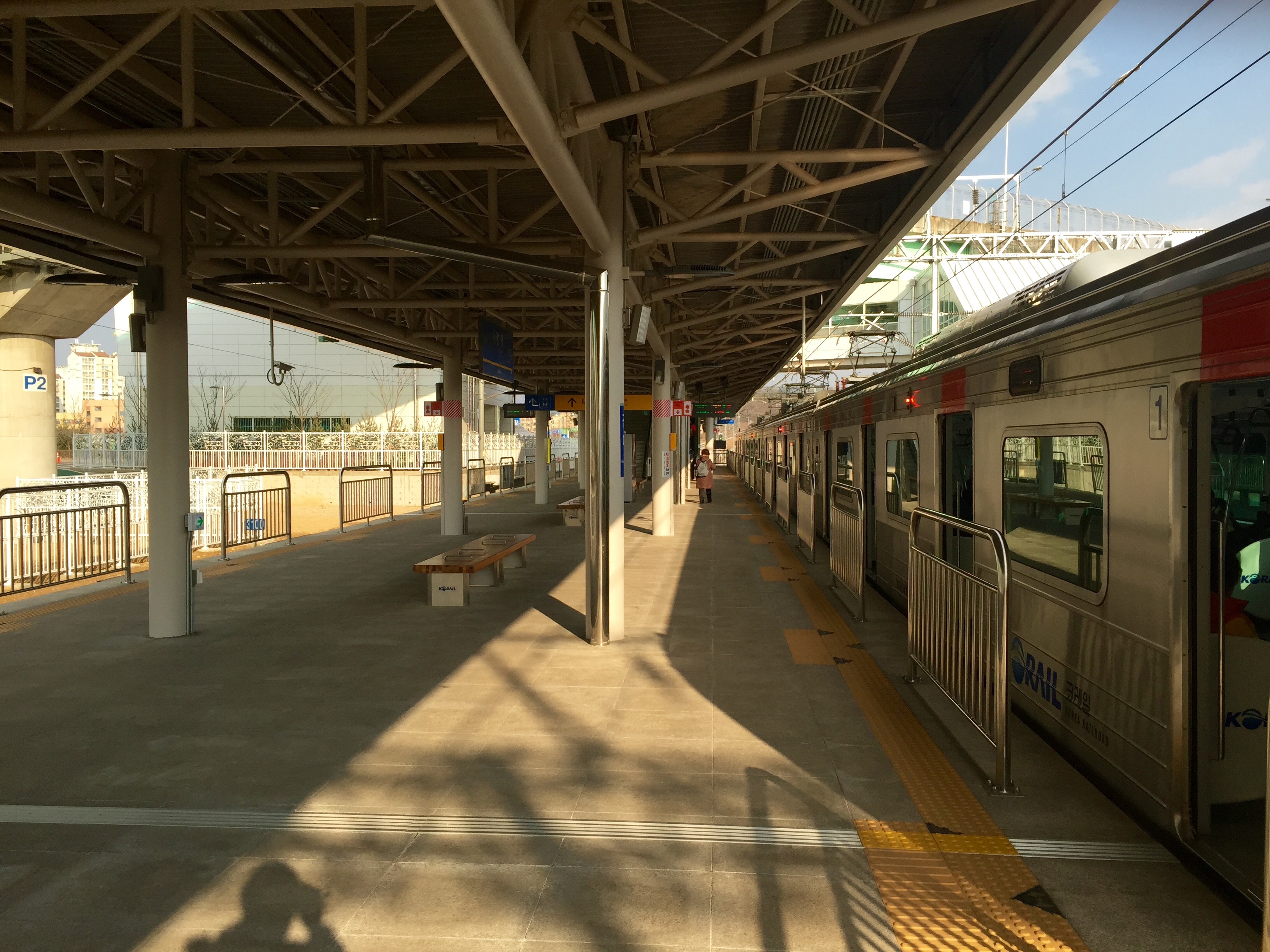 경의선 강매역 승강장